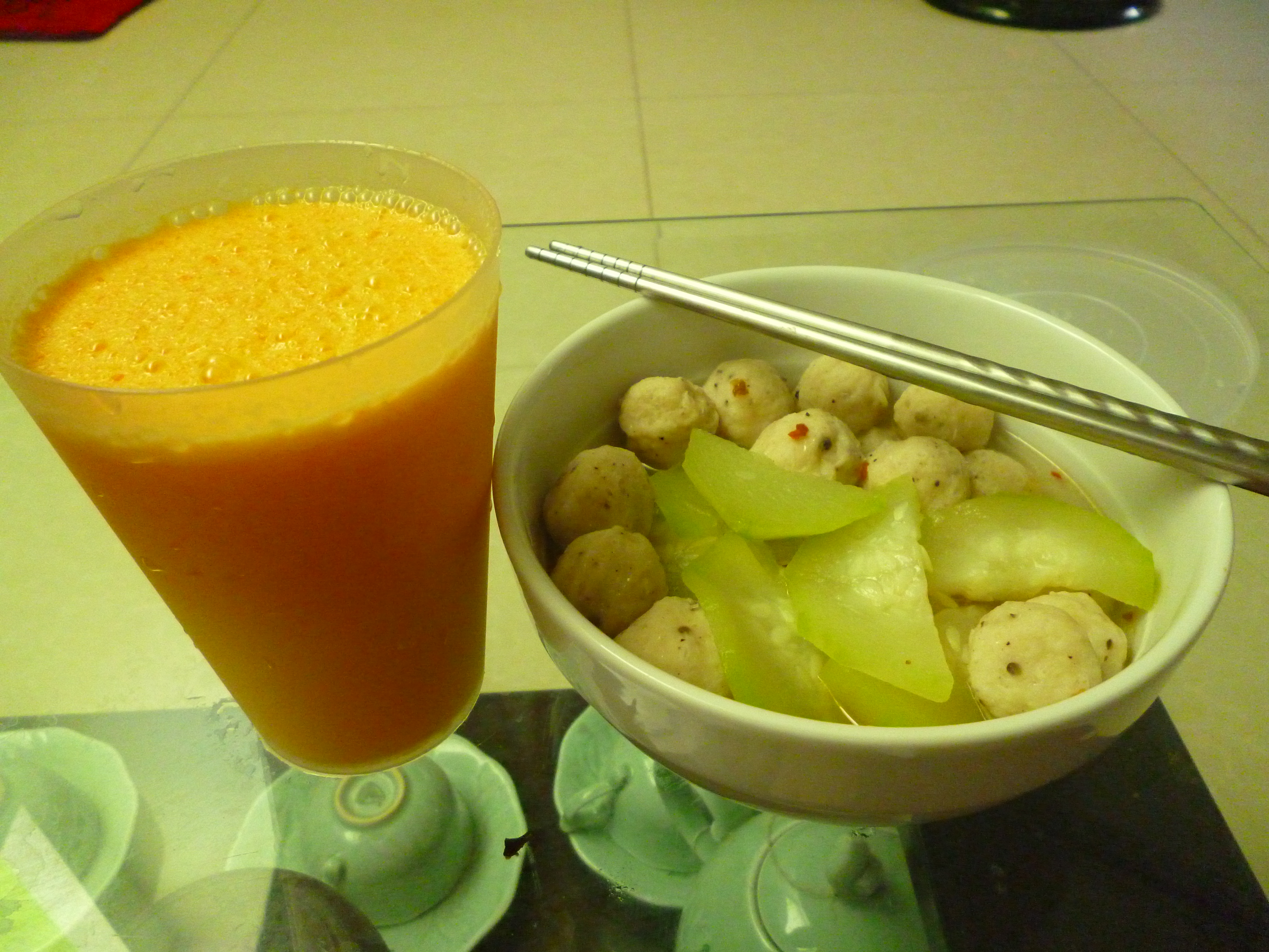 Hình tự chụp bằng máy ảnh cá nhân về món cá viên do gia đình nấu